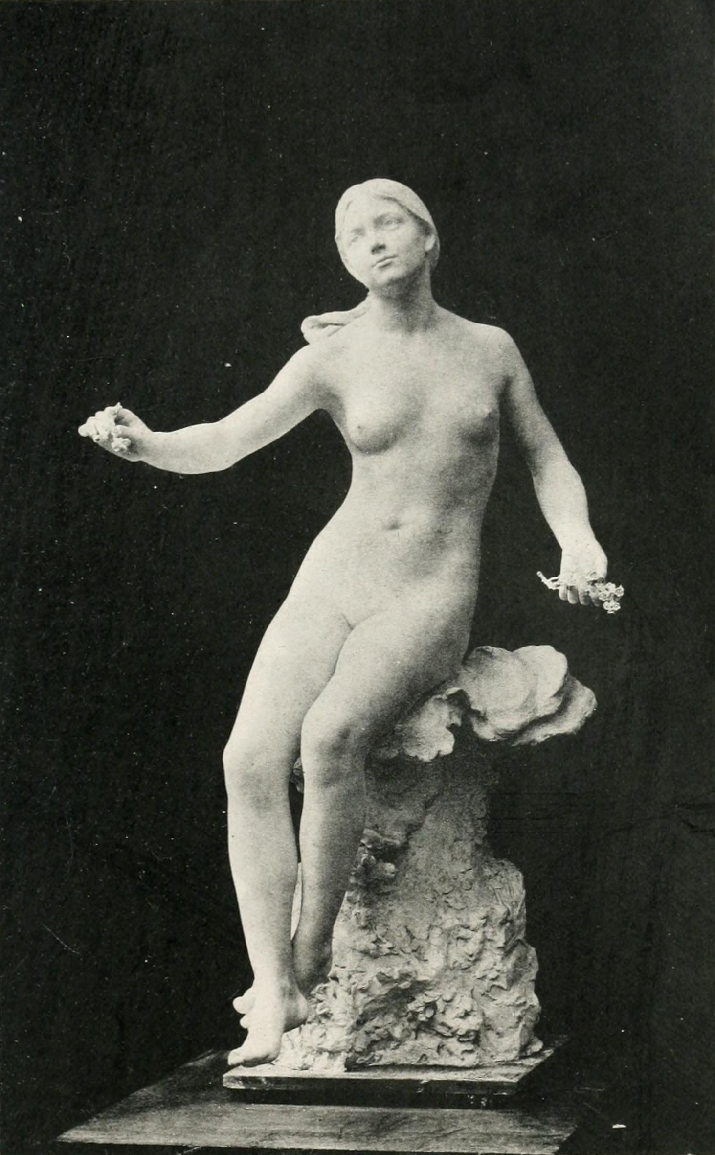 Printemps